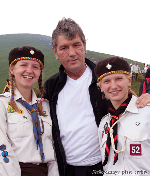 Президент України Віктор Ющенко сфотографувався разом з членами молодіжної організації "ПЛАСТ", після сходження на найвищу вершину України гору Говерлу і відкриття монумету - гранітний тризуб 18 липня 2008 року.